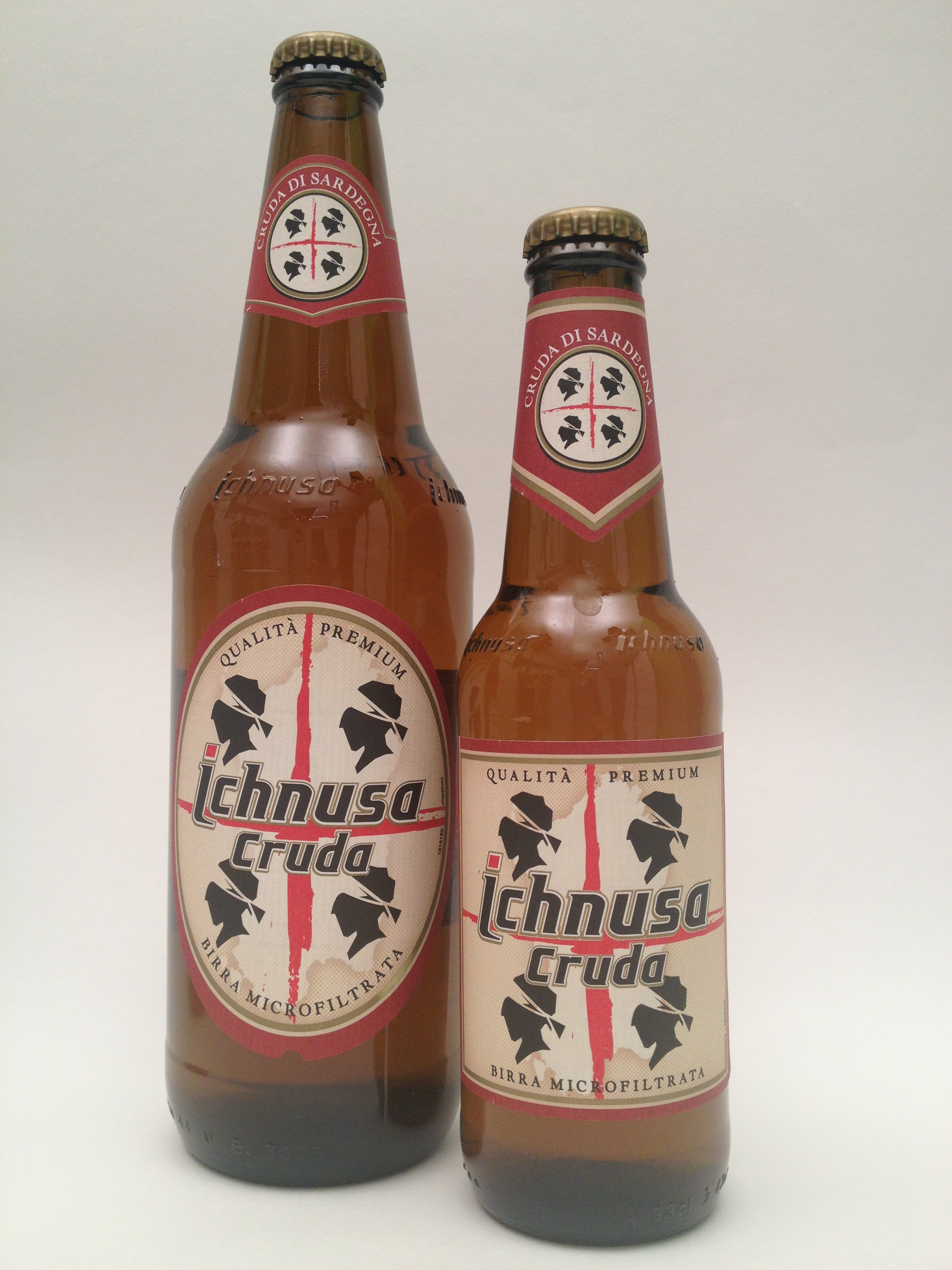 Birra Ichnusa Cruda, 66 cl e 33 cl